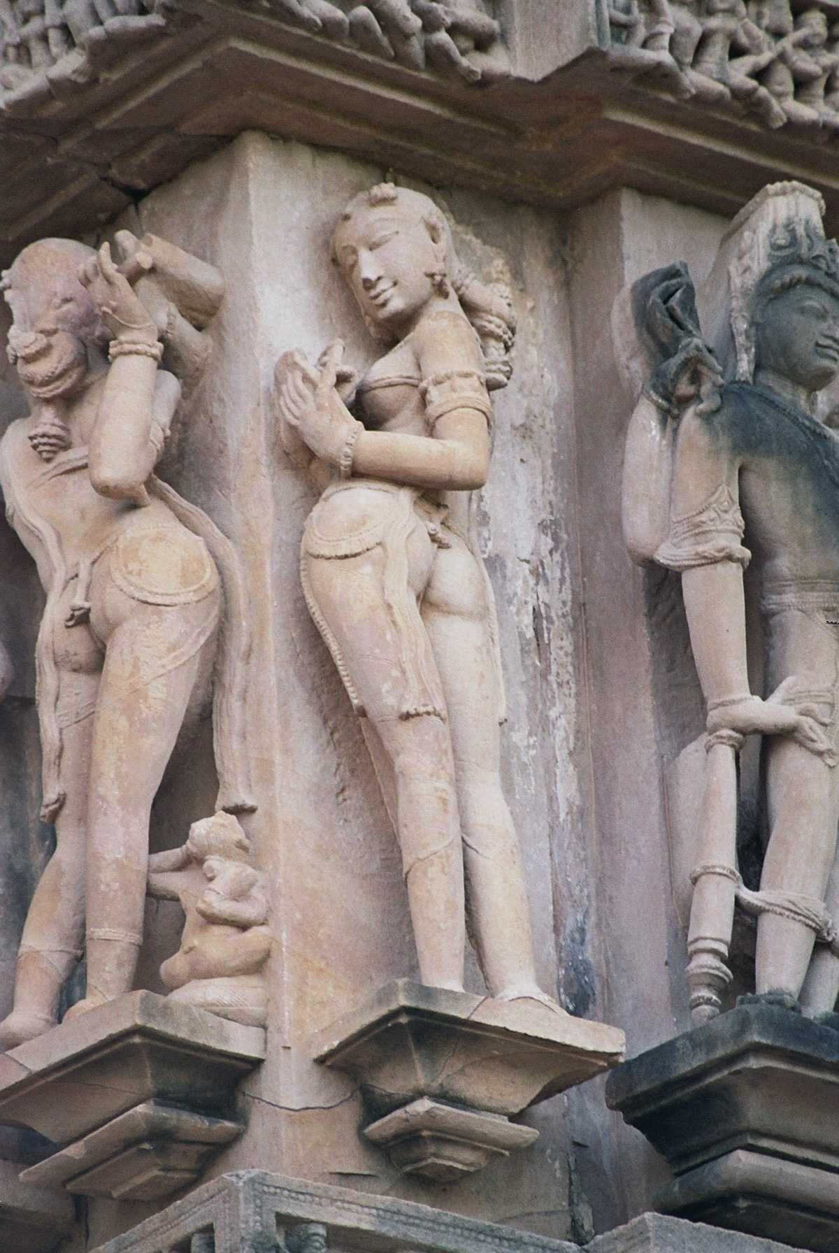 Khajuraho Temple, India Templo de Khajuraho, India. Picture take by User:Airunp